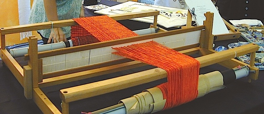 foto mia personale, il mio telaio Licensing Categoria:Immagini sulla tessitura